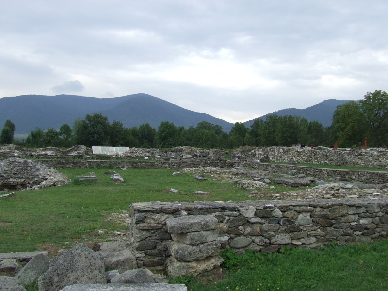 Sarmizegetuza, Hunedoara County, Romania